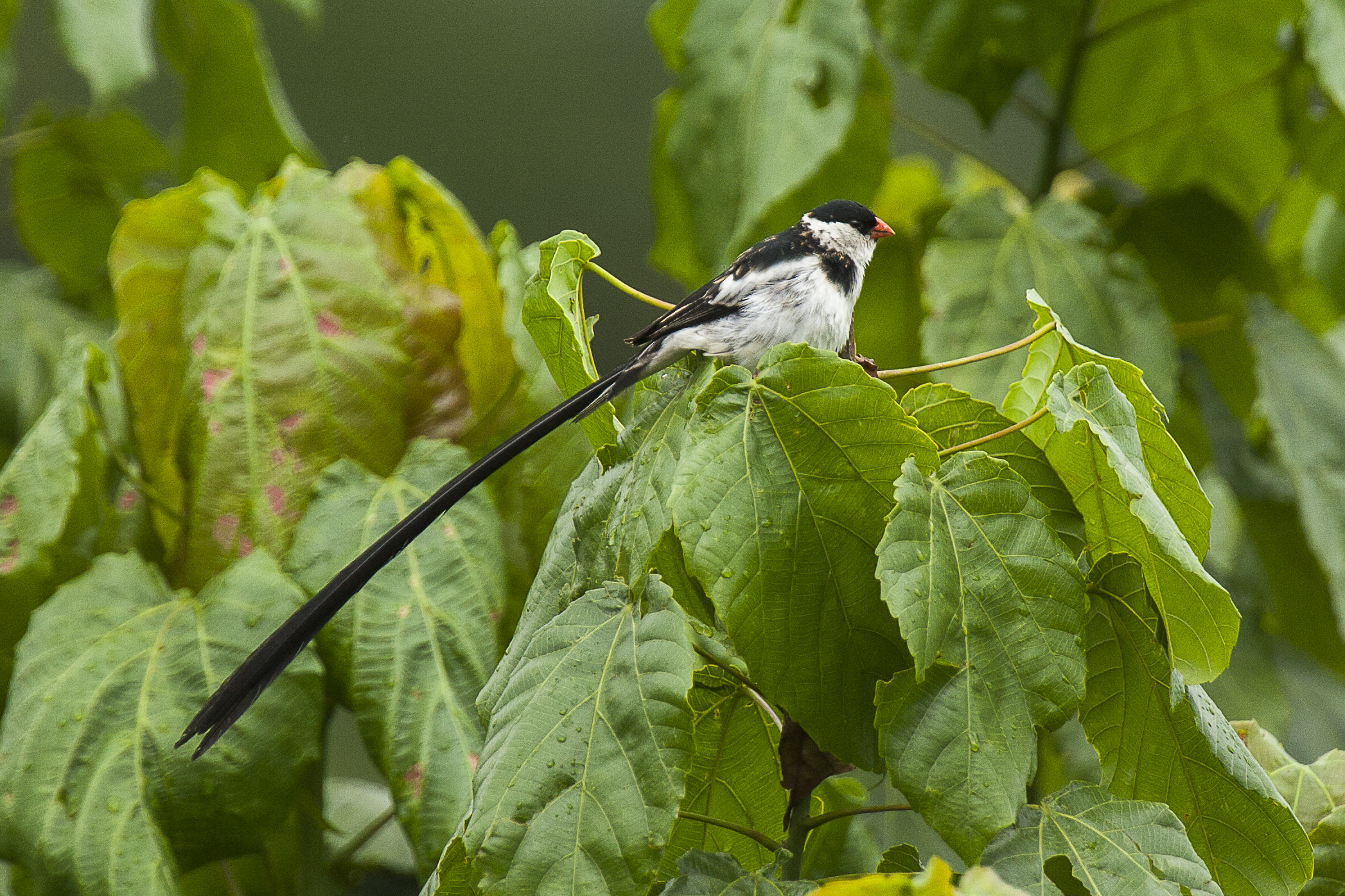 Pin-tailed Whydah - Bwindi - Uganda _H8O3464